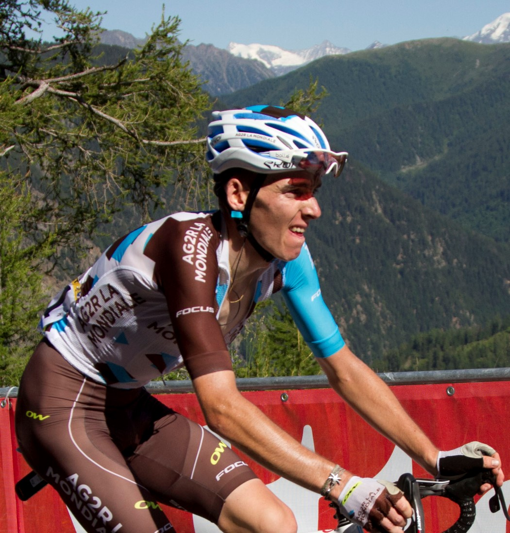 247 bardet